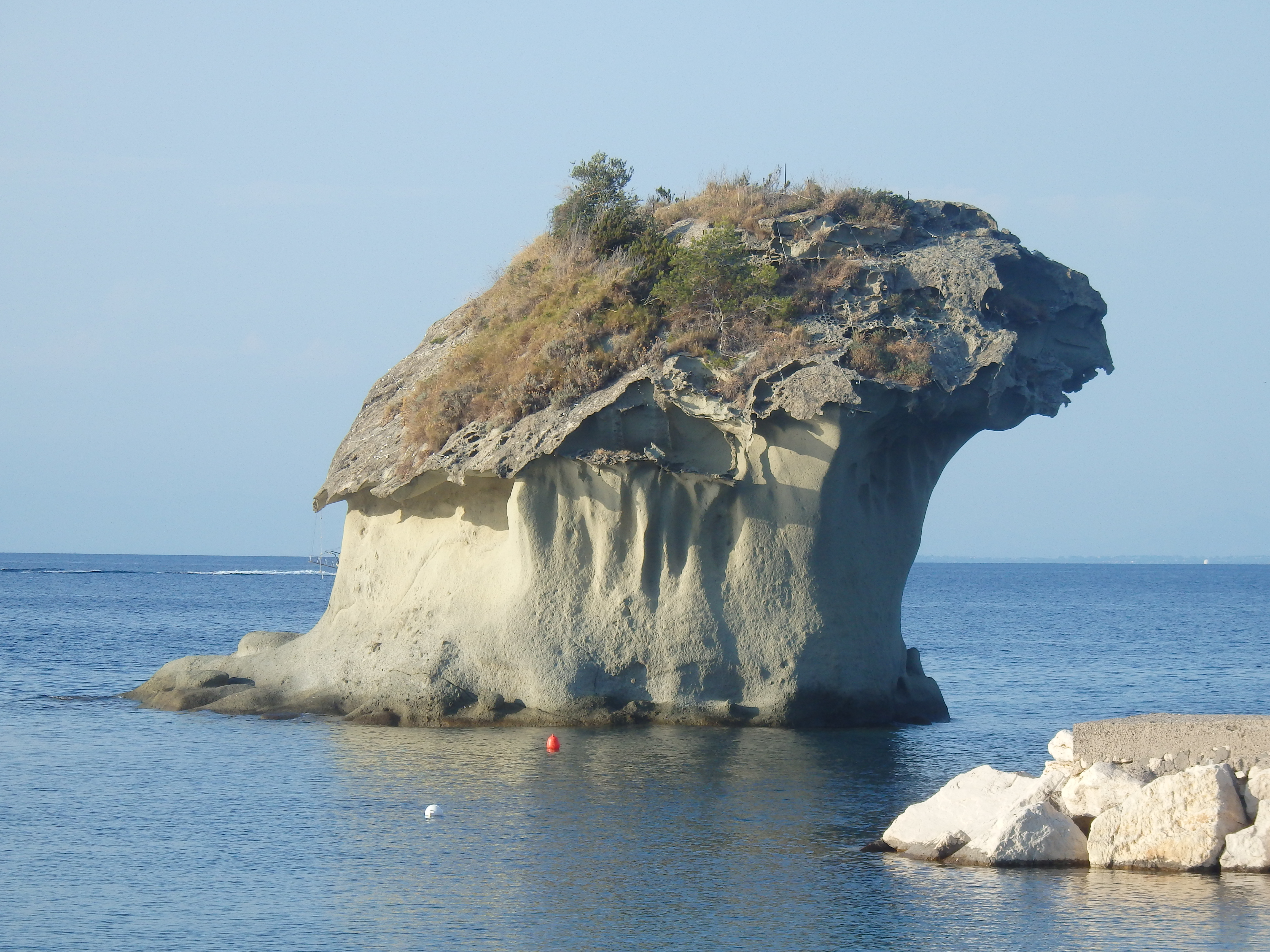 Il fungo della costa di Lacco Ameno a Ischia.